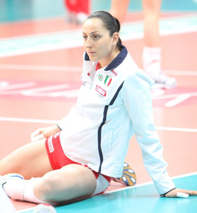 Carolina Costagrande, pallavolista argentina, naturalizzata italiana, gioca nel ruolo di schiacciatrice